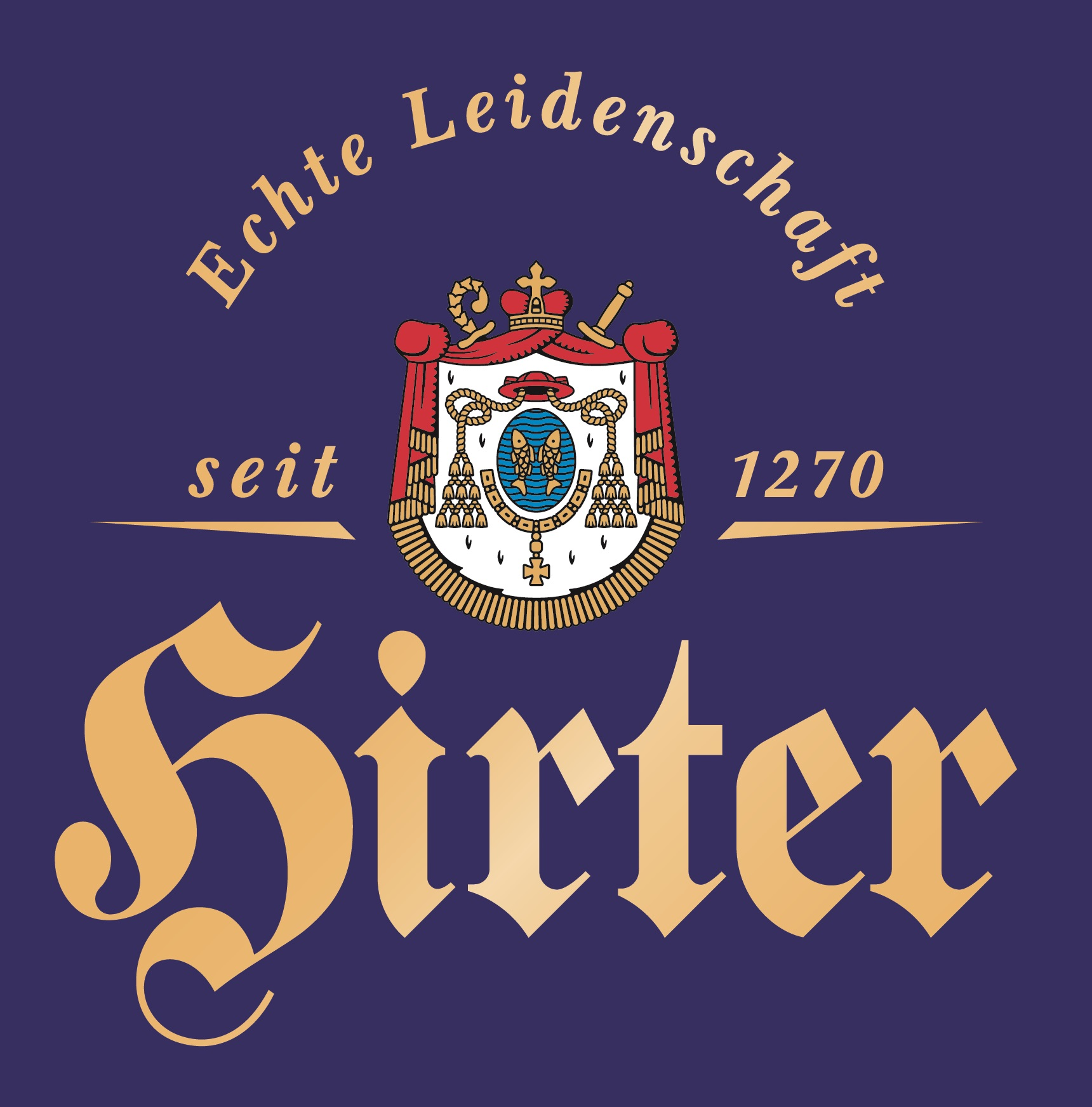 Logo der Privatbrauerei Hirt, Kärnten, Österreich mit dem Wappen des Fürstbischofs von Gurk, Kardinal Franz von Salm-Reifferscheidt (1749–1822)